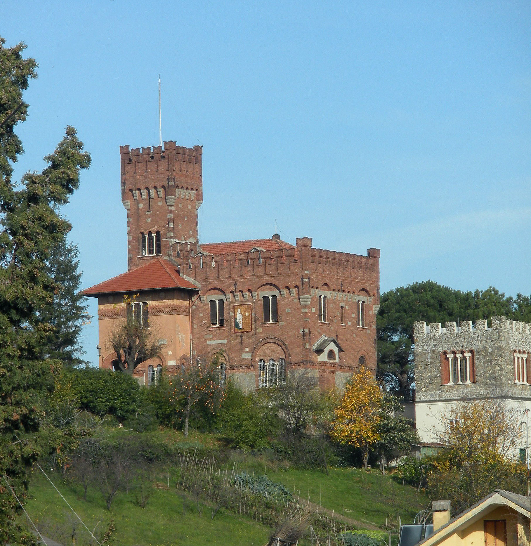 Il castello Parodi a San Cipriano (Serra Riccò, Genova) Foto propria Novembre 2009 Licensing Categoria:Serra Riccò